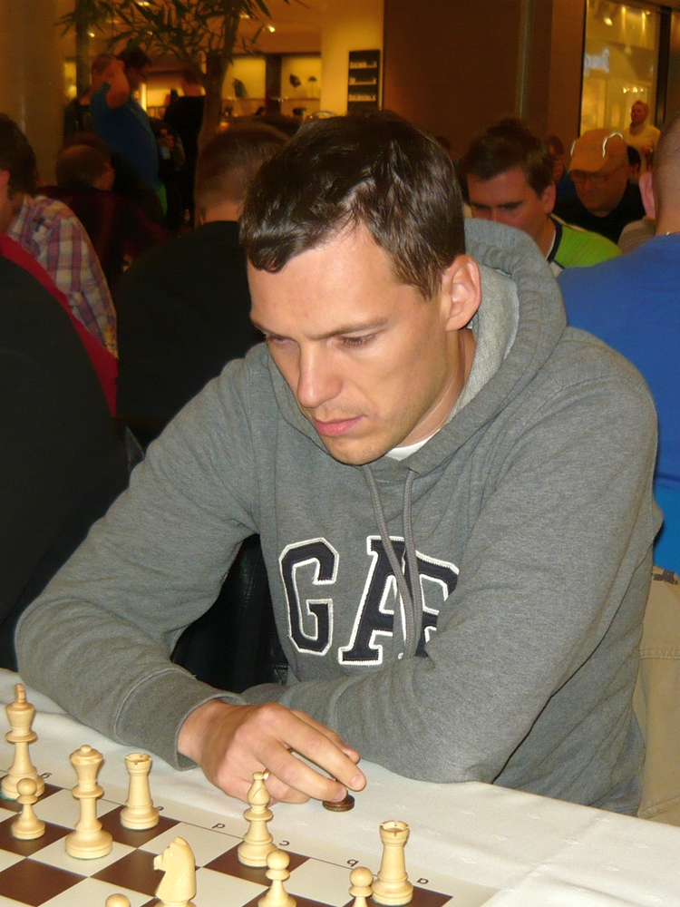 GM Rafał Antoniewski, Mistrzostwa Polski w Szachach Błyskawicznych, Bydgoszcz 2014.